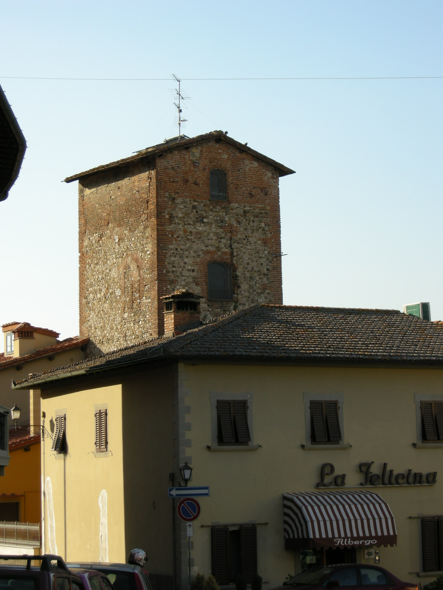 San piero a sieve, torre